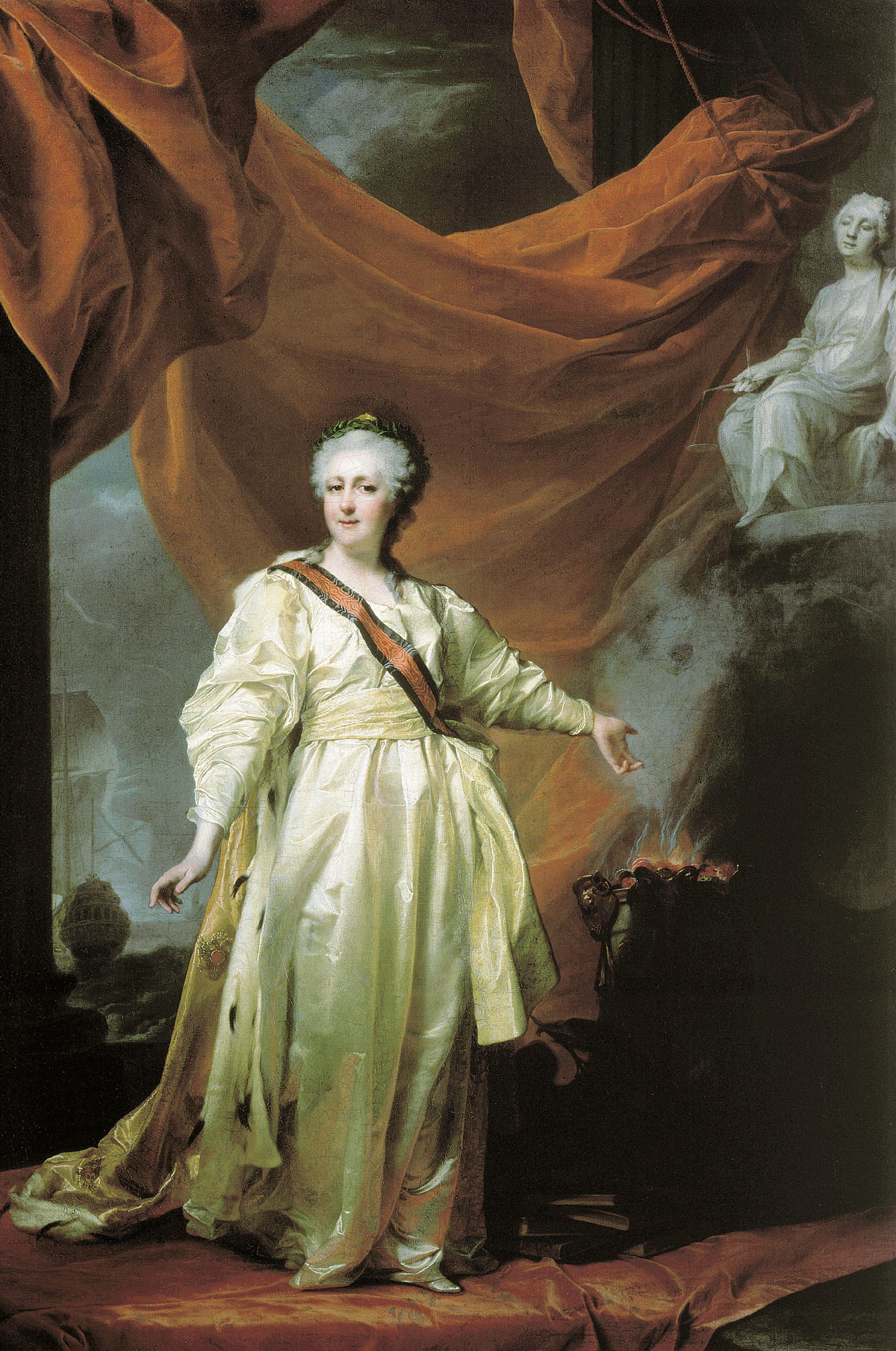 Портрет Екатерины II в виде законодательницы в храме богини Правосудия. Начало 1780-х. ЛЕВИЦКИЙ Дмитрий Григорьевич. Холст, масло. 110x77 см. Государственная Третьяковская галерея, Москва.